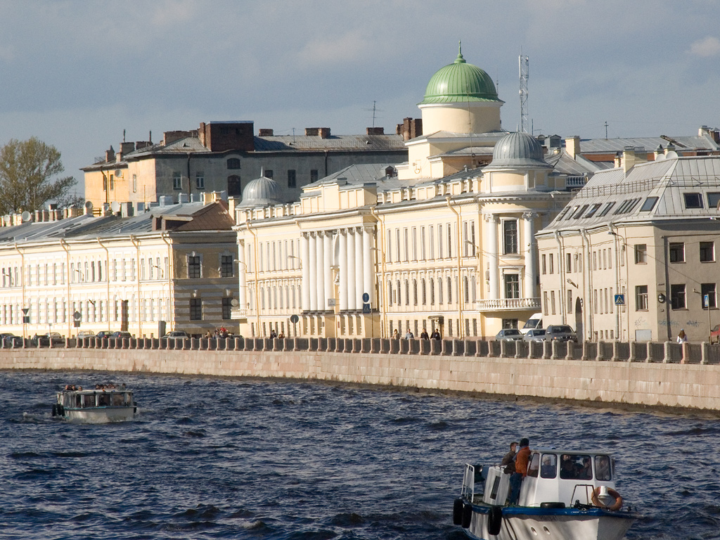 Здание училища правоведения на набережной Фонтанки в Санкт-Петербурге.